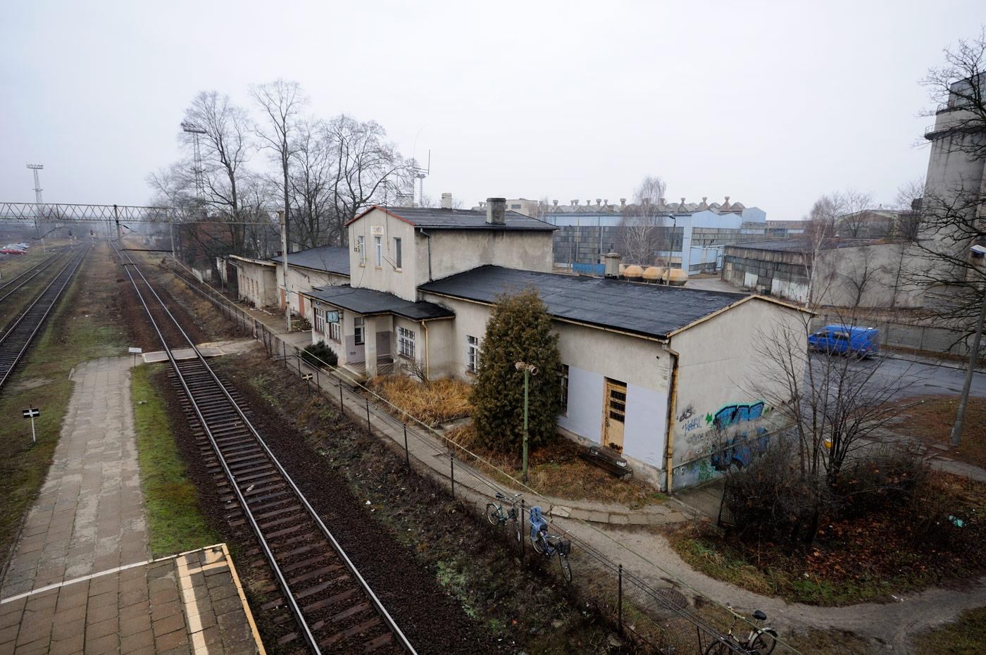 Budynek stacyjny widziany z kładki nad torami kolejowymi. Z prawej strony huta "Małapanew".